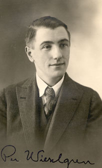 Per Wieselgren, rootsi filoloog